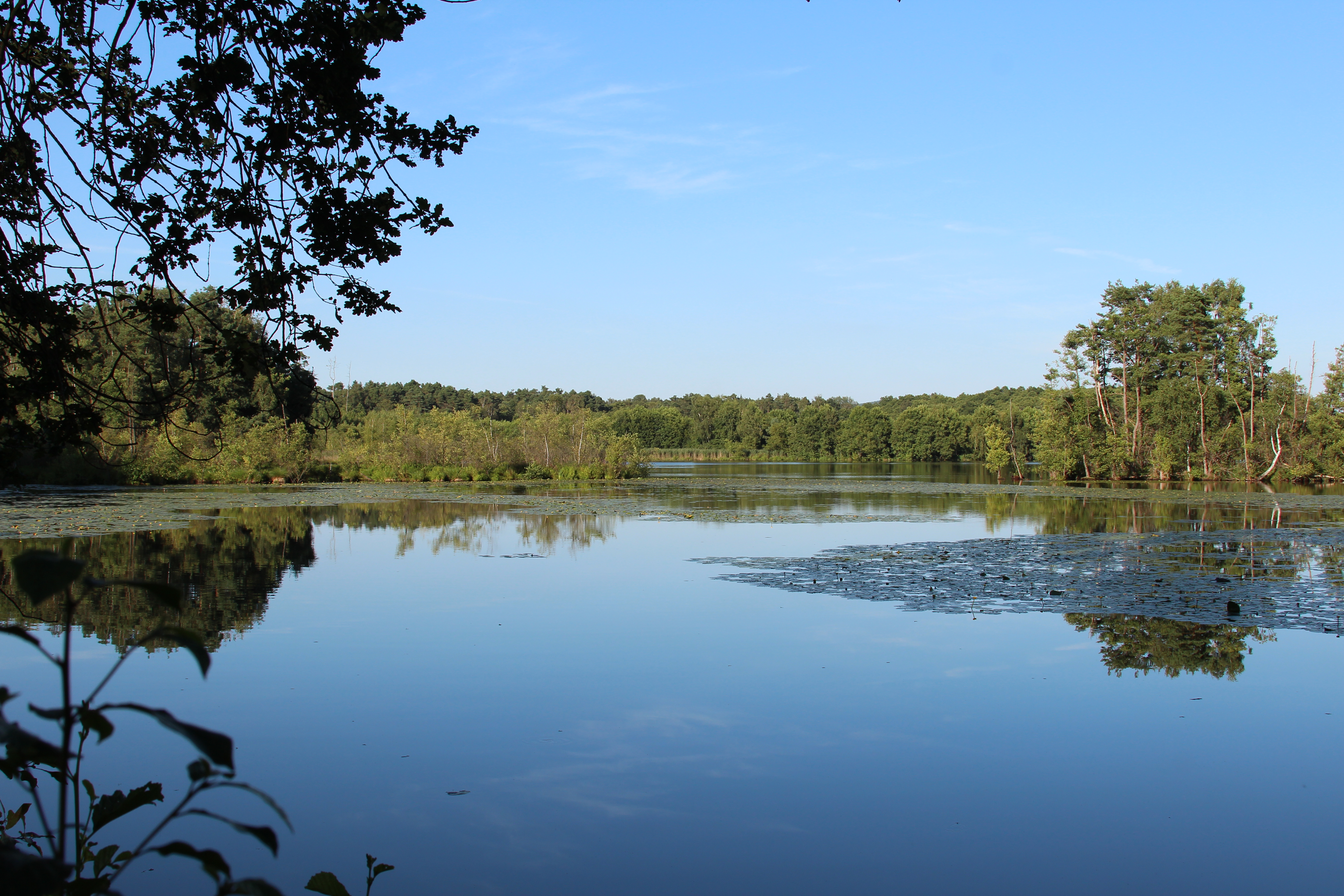 Charlottenhofer Weihergebiet, Forstweiher: Landkreis Schwandorf, Oberpfalz, Bayern